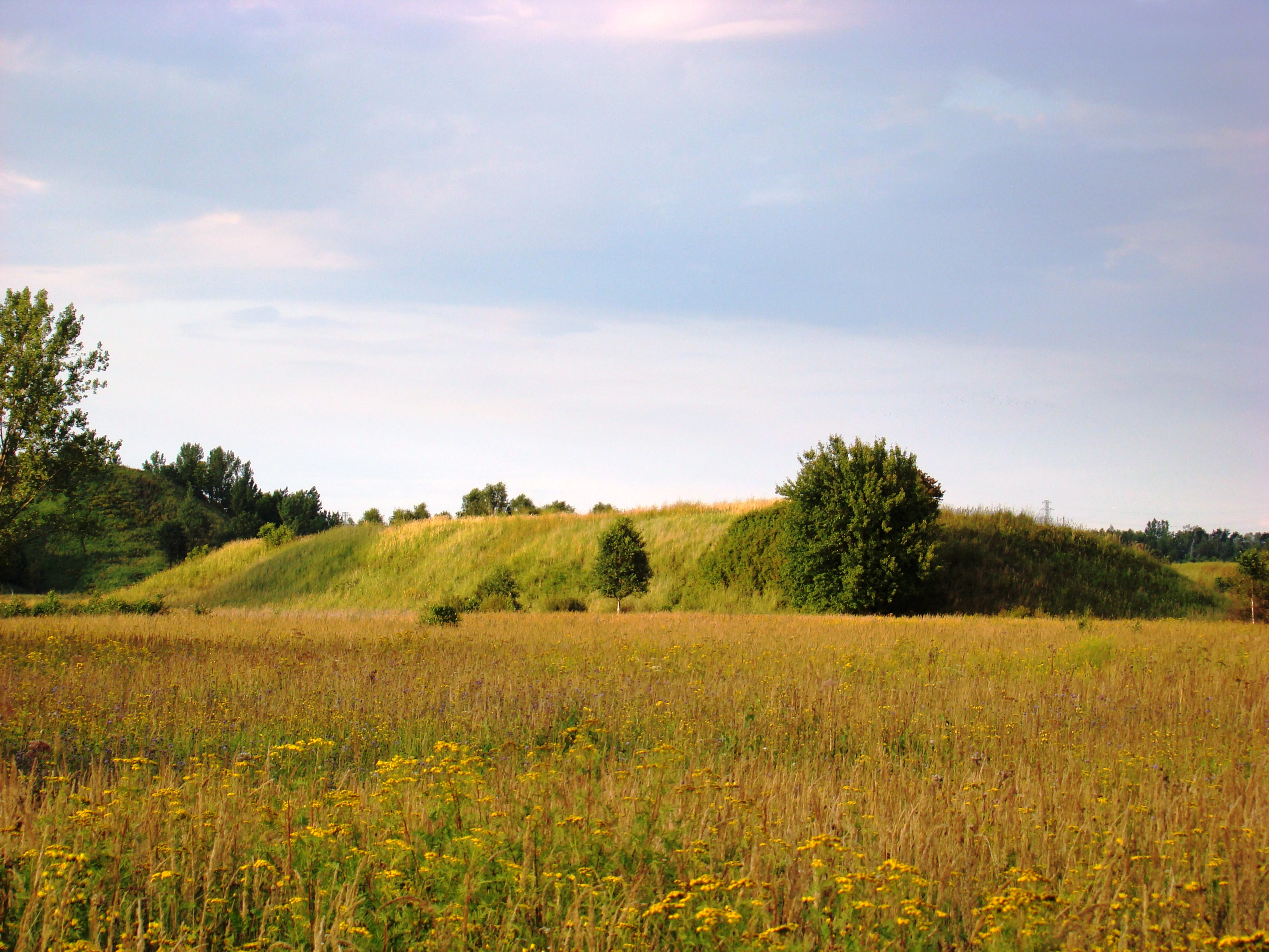 Pozostałości hałdy kopalni rud żelaza "Franciszek stary" w okolicach Liszki Dolnej